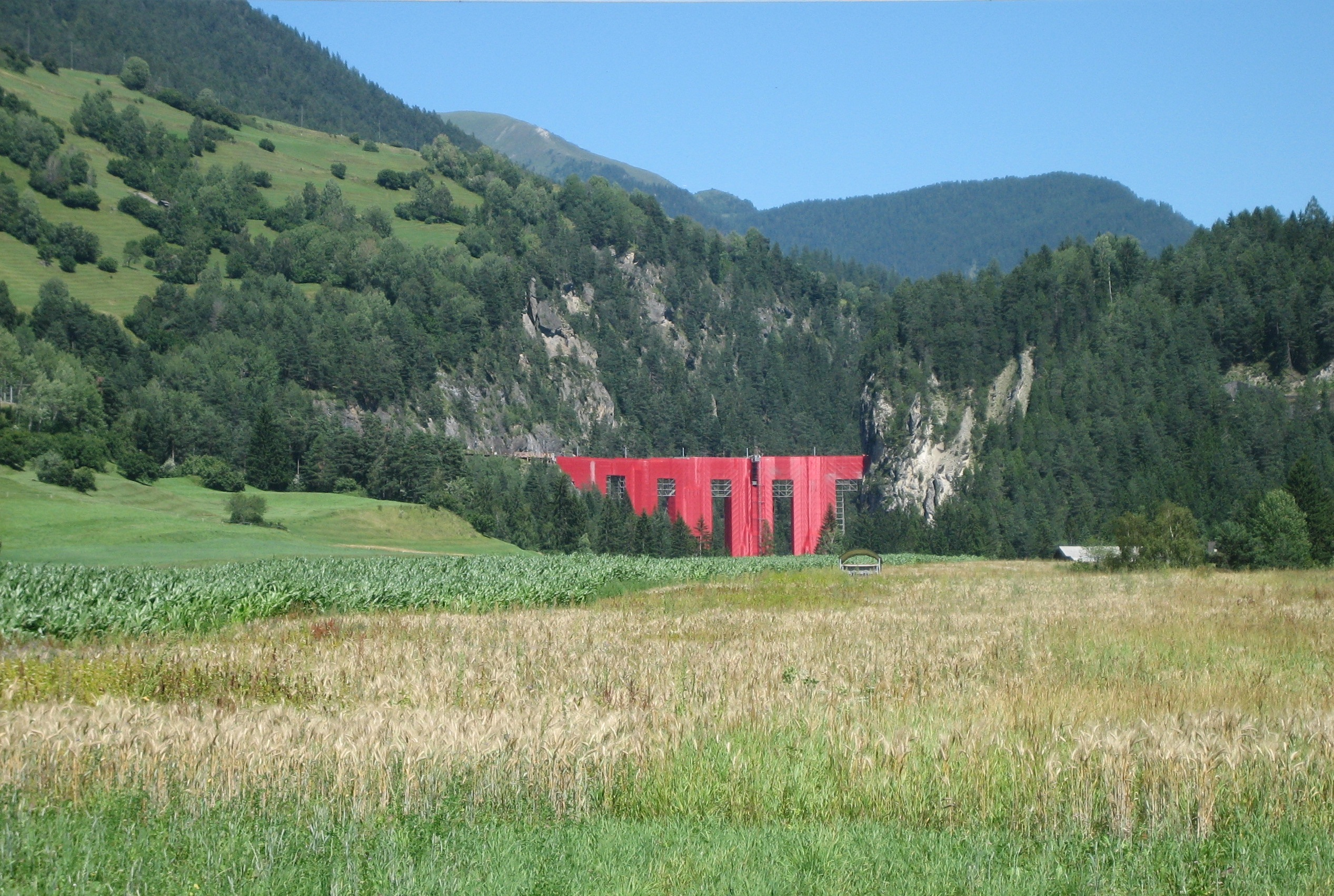 Landewasserviadukt im Sommer 2009